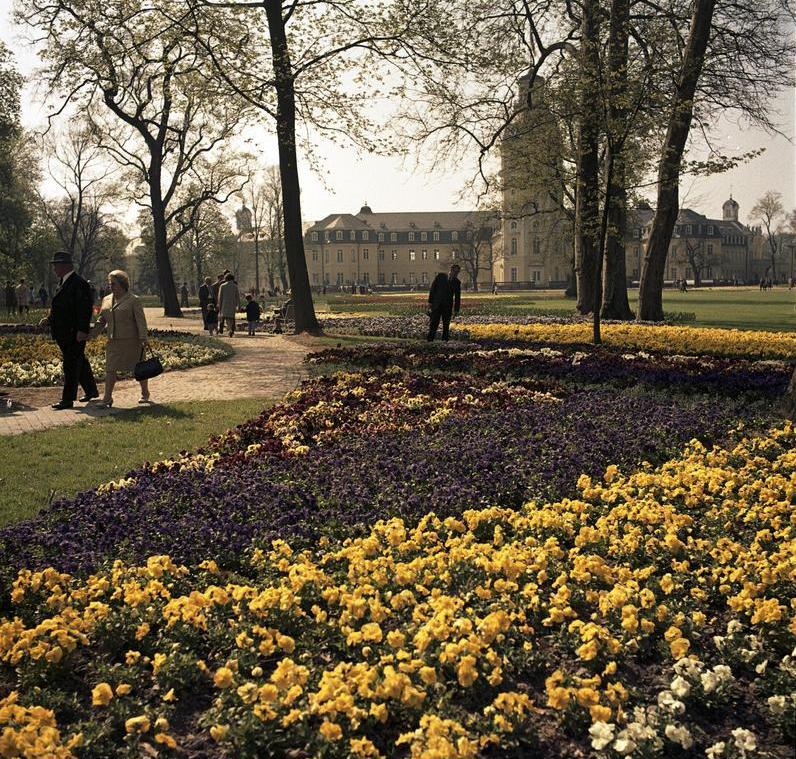 Bundesgartenschau 1967 Karlsruhe